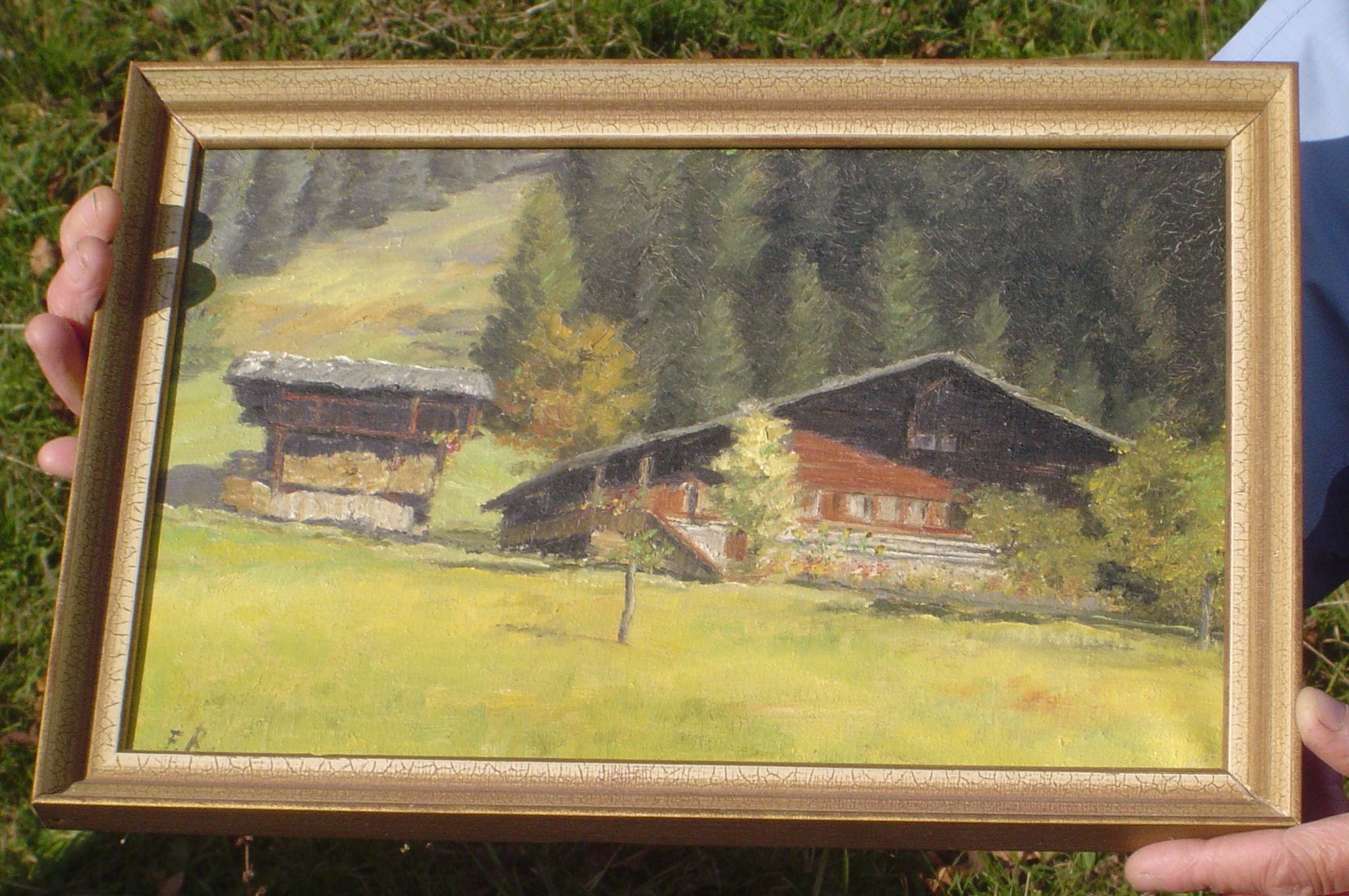 on a old painting